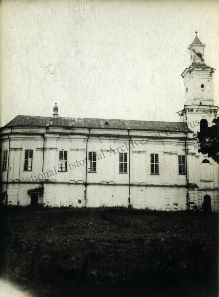 Беларуская (тарашкевіца): Сялец (Sialec), або Ануфрыева (Anufryjeva). Царква Сьвятога Ануфрыя